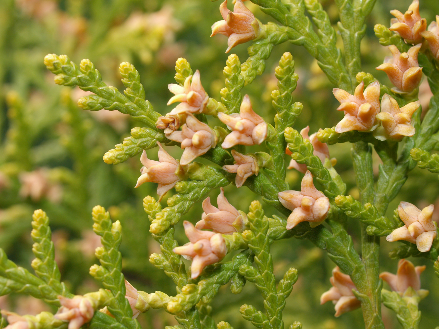 Platycladus orientalis, conos femeninos inmaduros. Madrid.